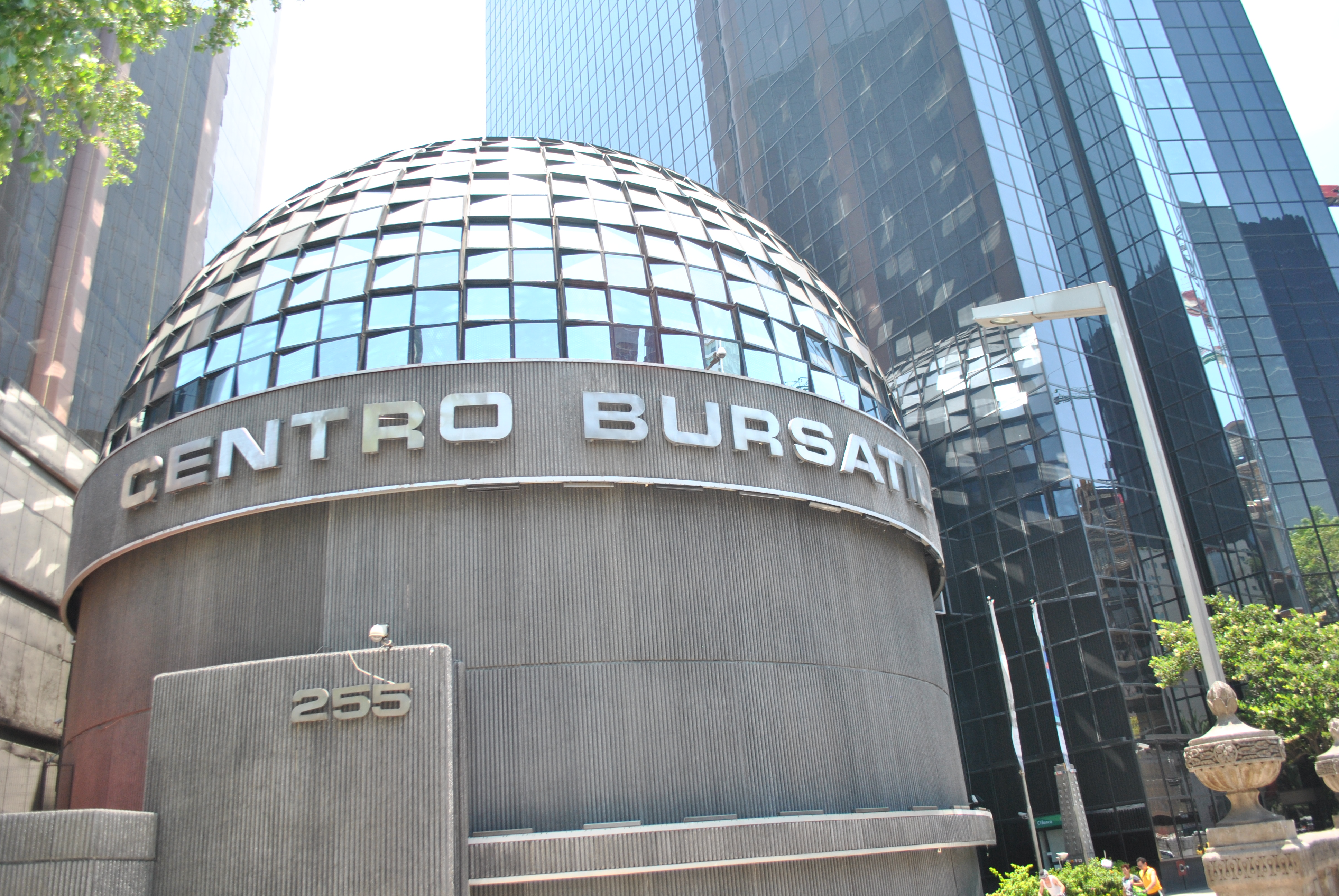 Es el centro bursátil de México, se ubica en la avenida Reforma, en la Ciudad de México.